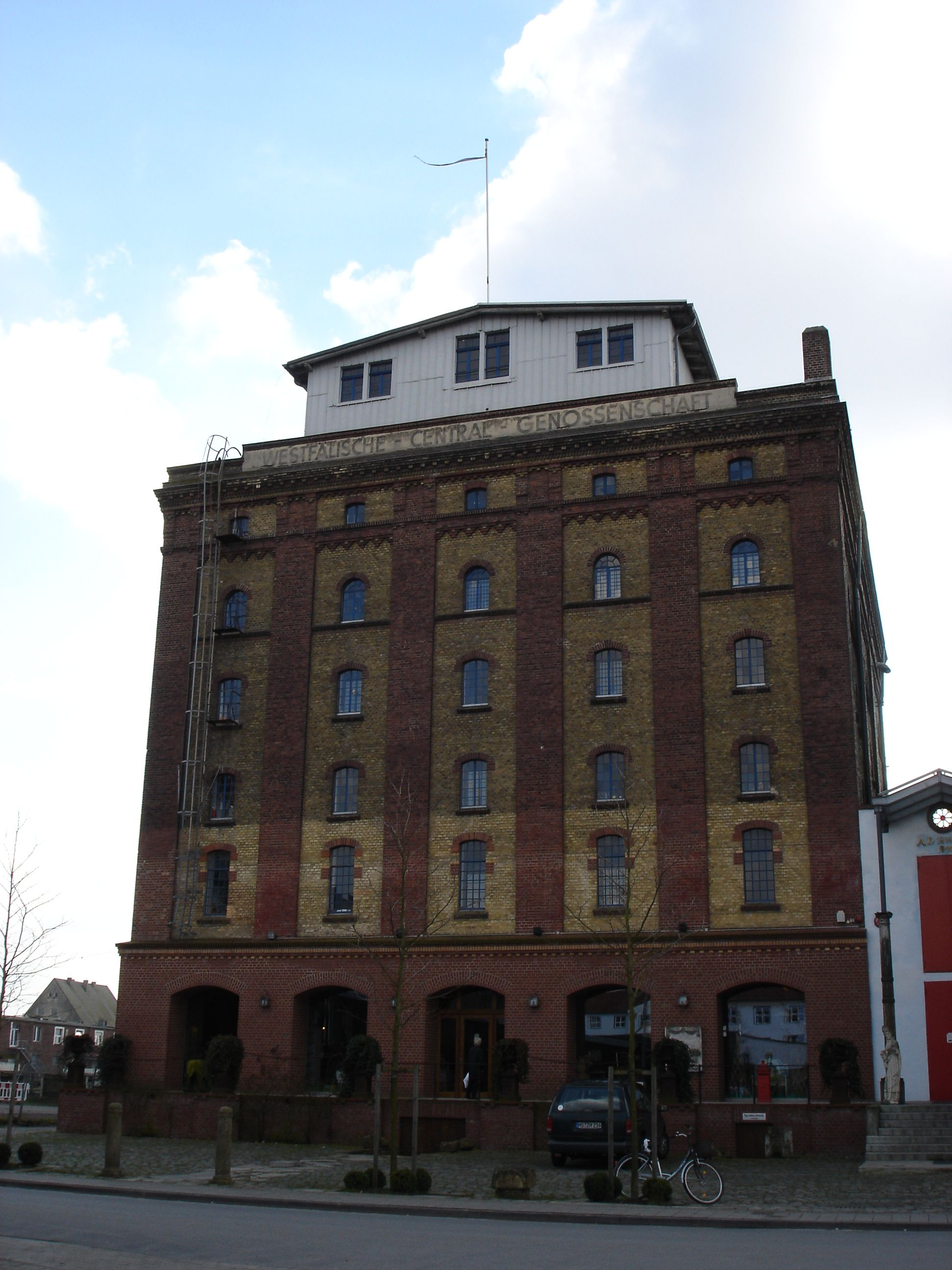 Coppenrath-Verlag in Münster, Westfalen, Deutschland. Building of the former "Westfälische Central Genossenschaft", a grain warehouse of the year 1899